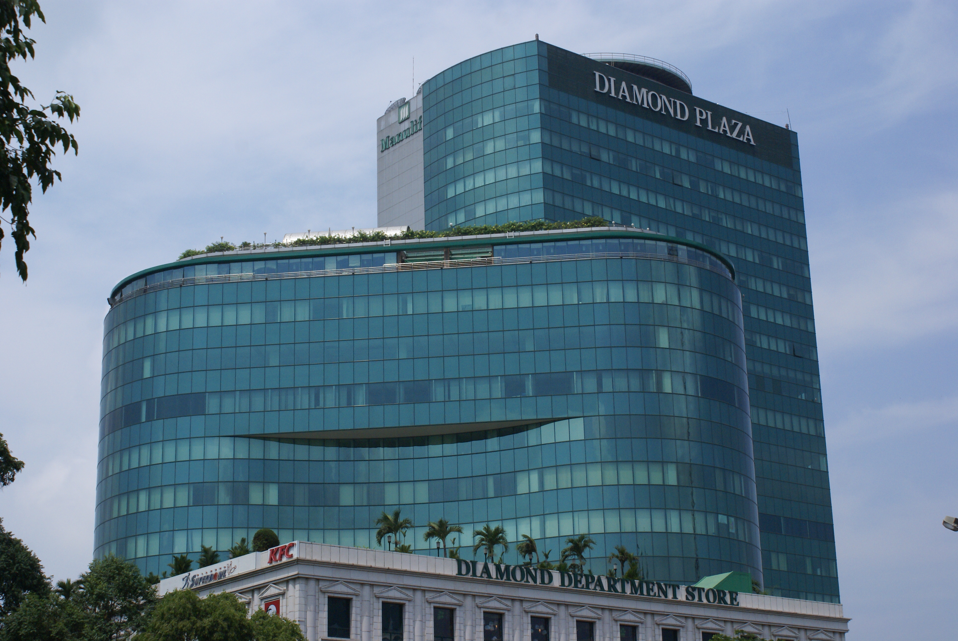 Diamond Plaza Skyscraper